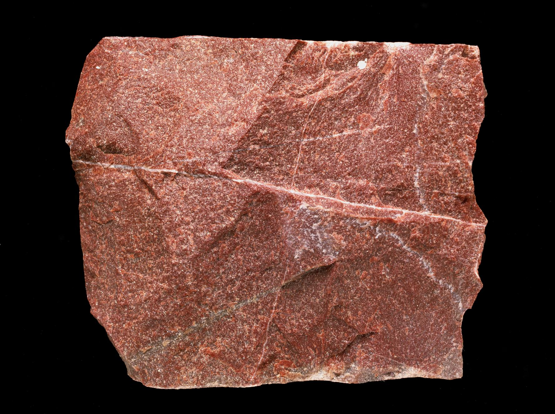 Gästriklands landskapssten är gävlesandstenen. Trots att den är väl undersökt är föga känt om åldern på denna prekambriska sandsten. Den kan vara allt mellan 800 och 1500 miljoner år gammal. Den är röd med variationer i gult och grått. Den ursprungliga lagringen med vackra sedimentstrukturer finns ännu kvar. Skiktning, torksprickor och kornstorleksvariationer visar att stenen avsattes i ett torrt och varmt klimat. Den förekommer i ett stråk från Gävle till Storsjön i Jämtland. Dess motsvarighet på andra håll i landet kallas jotnisk sandsten. Gävlesandstenen har brutits i Gästrikland sedan mer än två hundra år och använts till kvarnstenar, slipstenar och som ställsten till masugnar. Kring förra sekelskiftet utnyttjades den flitigt som byggnadssten i husgrunder, trappor och portaler. Den har till exempel använts i Hallwylska palatset i Stockholm.